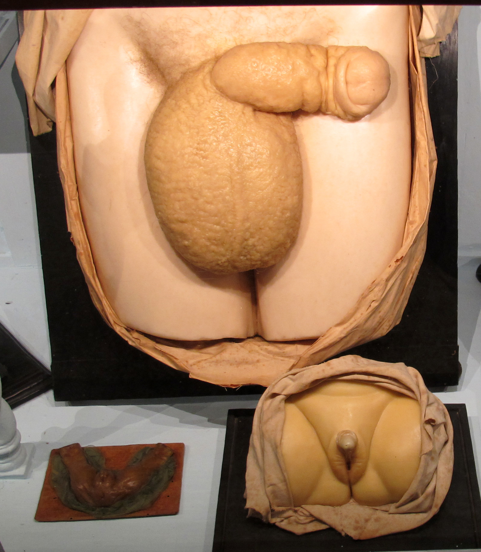 Istituto di anatomia patologica, museo, cere, 06 pene